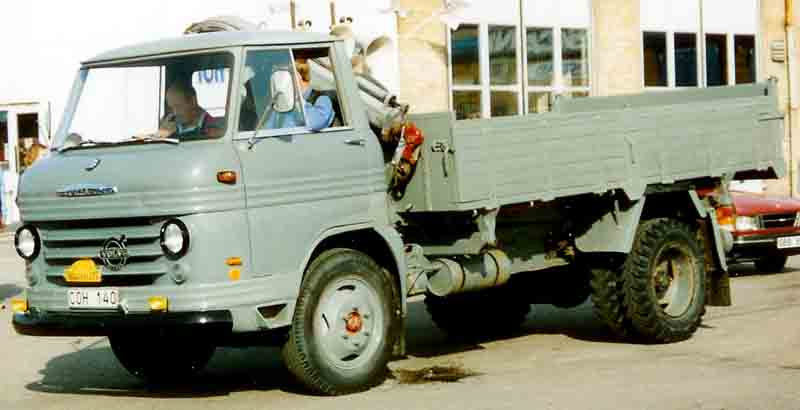 Volvo F83-34 Truck 1968